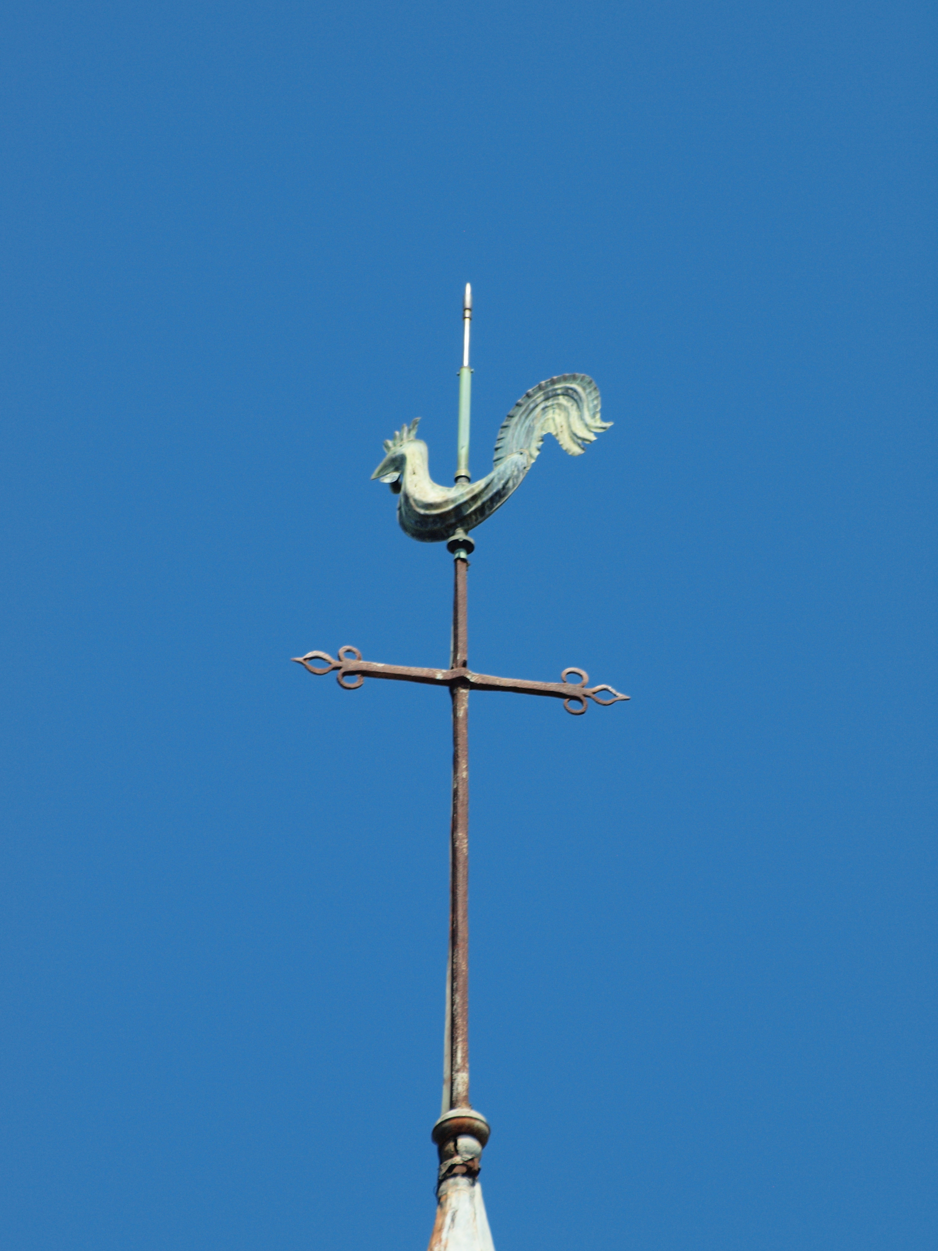 Église Saint-Pierre-et-Saint-Paul de Chaintreaux (Seine-et-Marne, France)